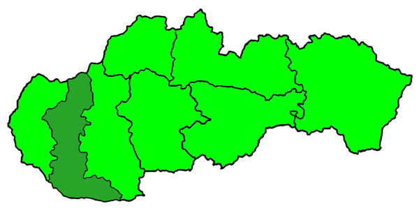 Mappa dell'arcidiocesi cattolica (roman catholic) di Trnava, in Slovacchia. Lavoro personale.